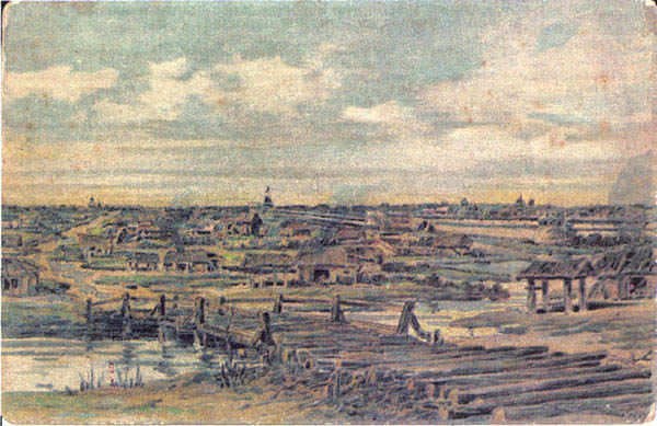 Вид на «Кучково поле» с берега р.Неглинной от Кузнецкого моста в XVI в. Художественная открытка товарищества А.И.Абрикосова.